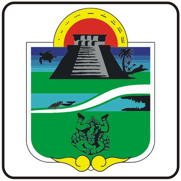 Escudo del Municipio de Tulum